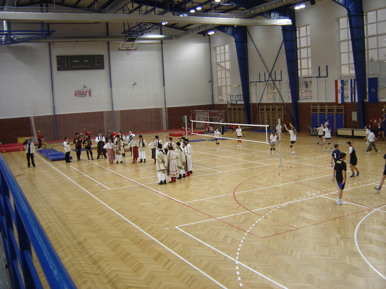 Nastavno-sportska dvorana u Belom Manastiru